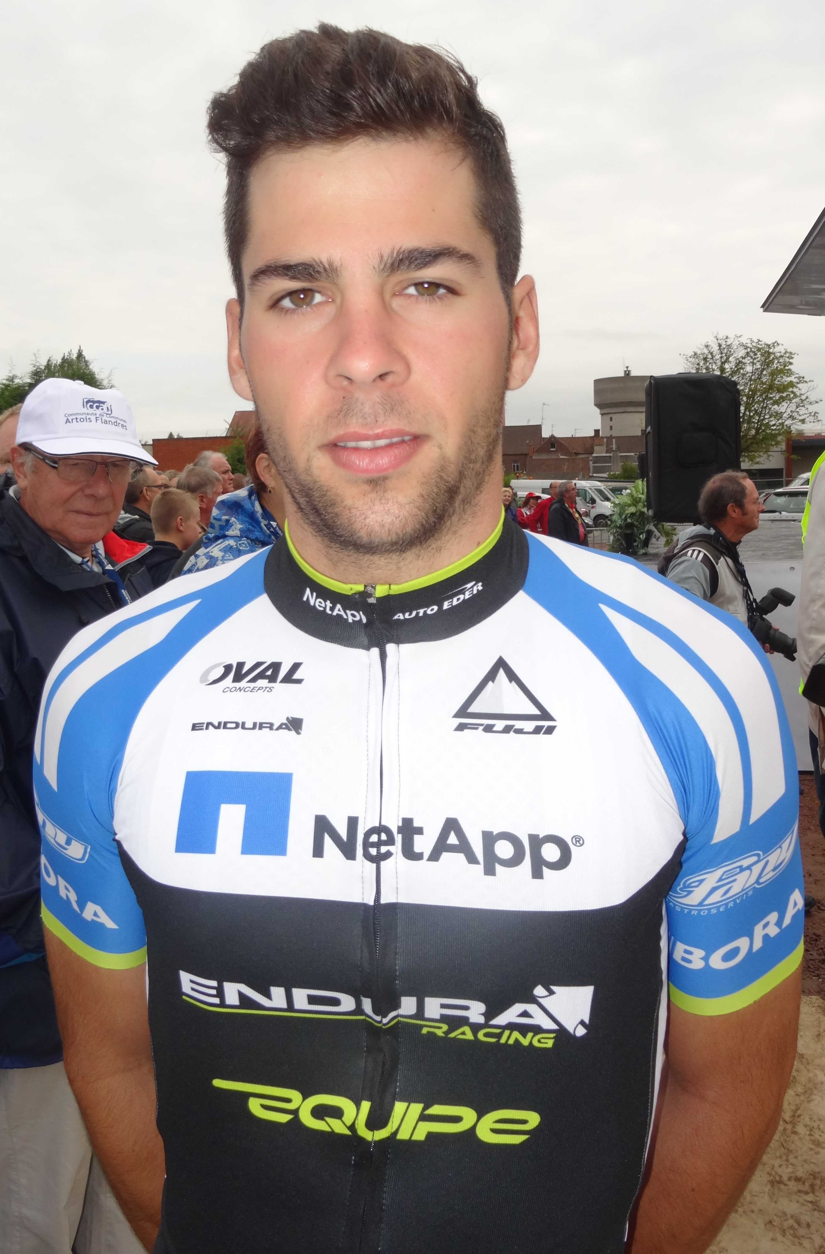 Reportage réalisé le dimanche 21 septembre à l'occasion du départ et de l'arrivée du Grand Prix d'Isbergues 2014 à Isbergues, Nord-Pas-de-Calais, France.